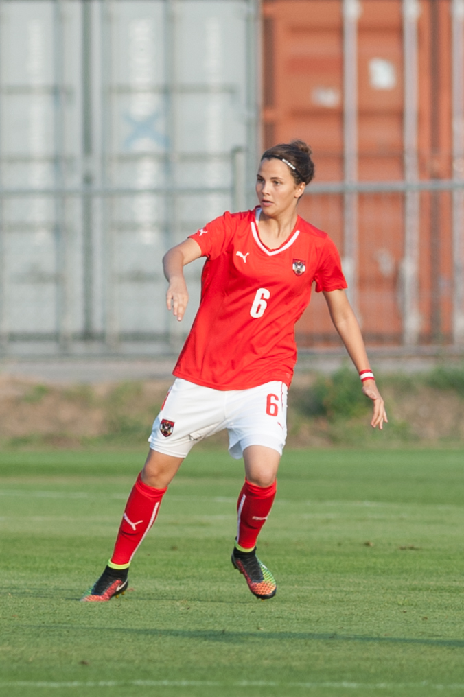 Frauenfußball U19 Testspiel Österreich - Norwegen am 12. August 2015 in Bad Erlach: Jennifer Klein